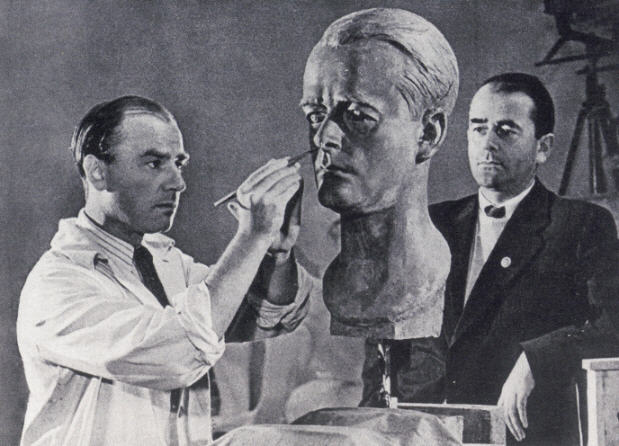 Copyright Museum Arno Breker/MARCO-VG, Bonn Toestemming publicatie.